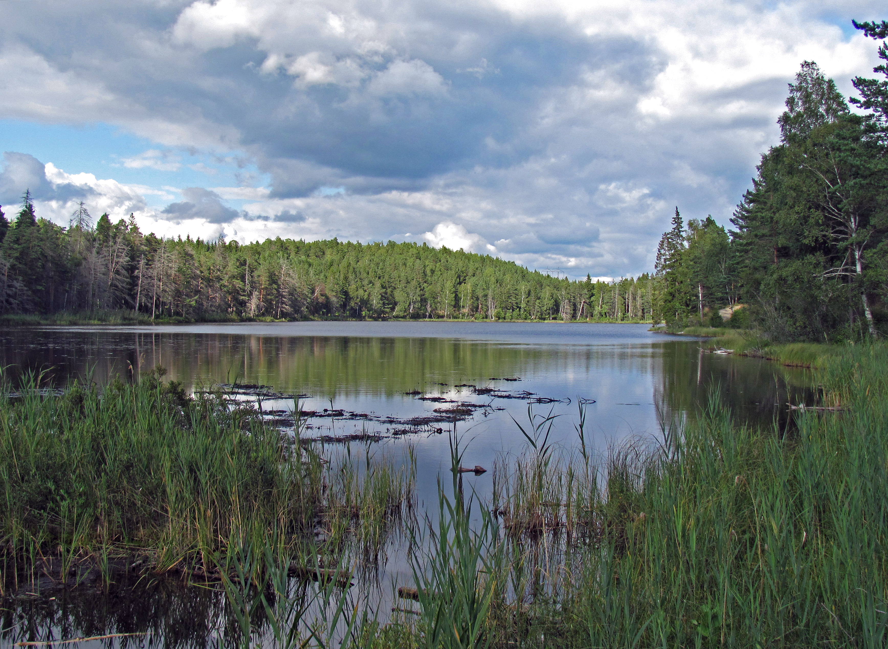 Kärrsjön (norra)